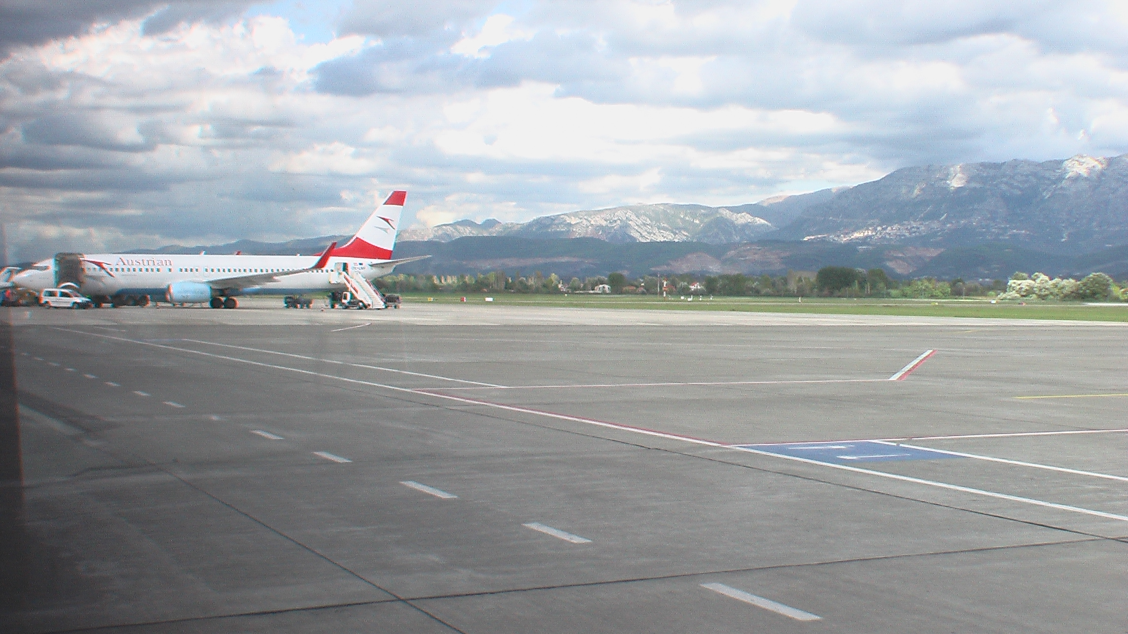 TiranaFlughafenAustrianAirlinesB737-800